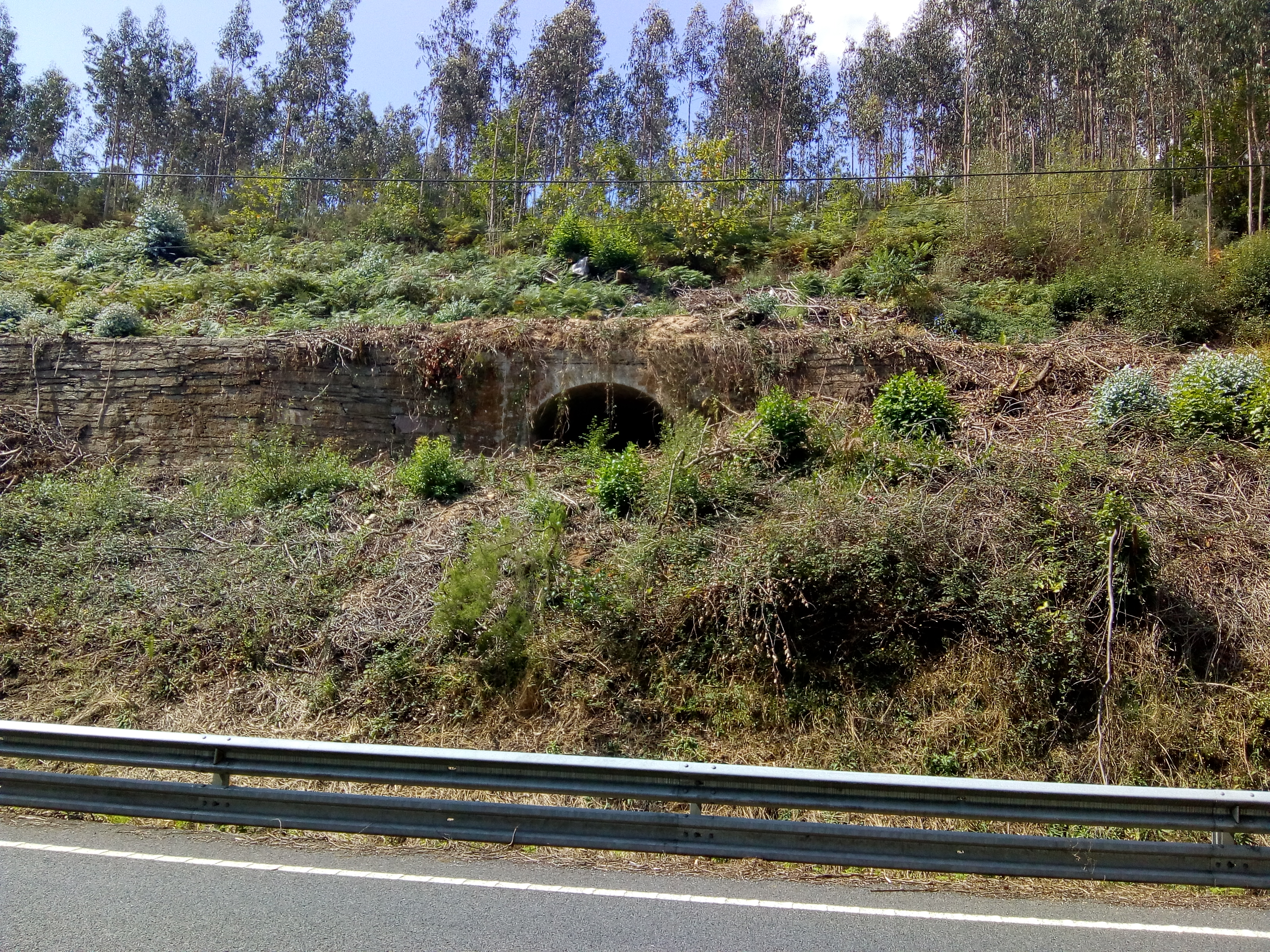 N 640 coa antiga liña de ferrocarril Ribadeo Vilaoudriz